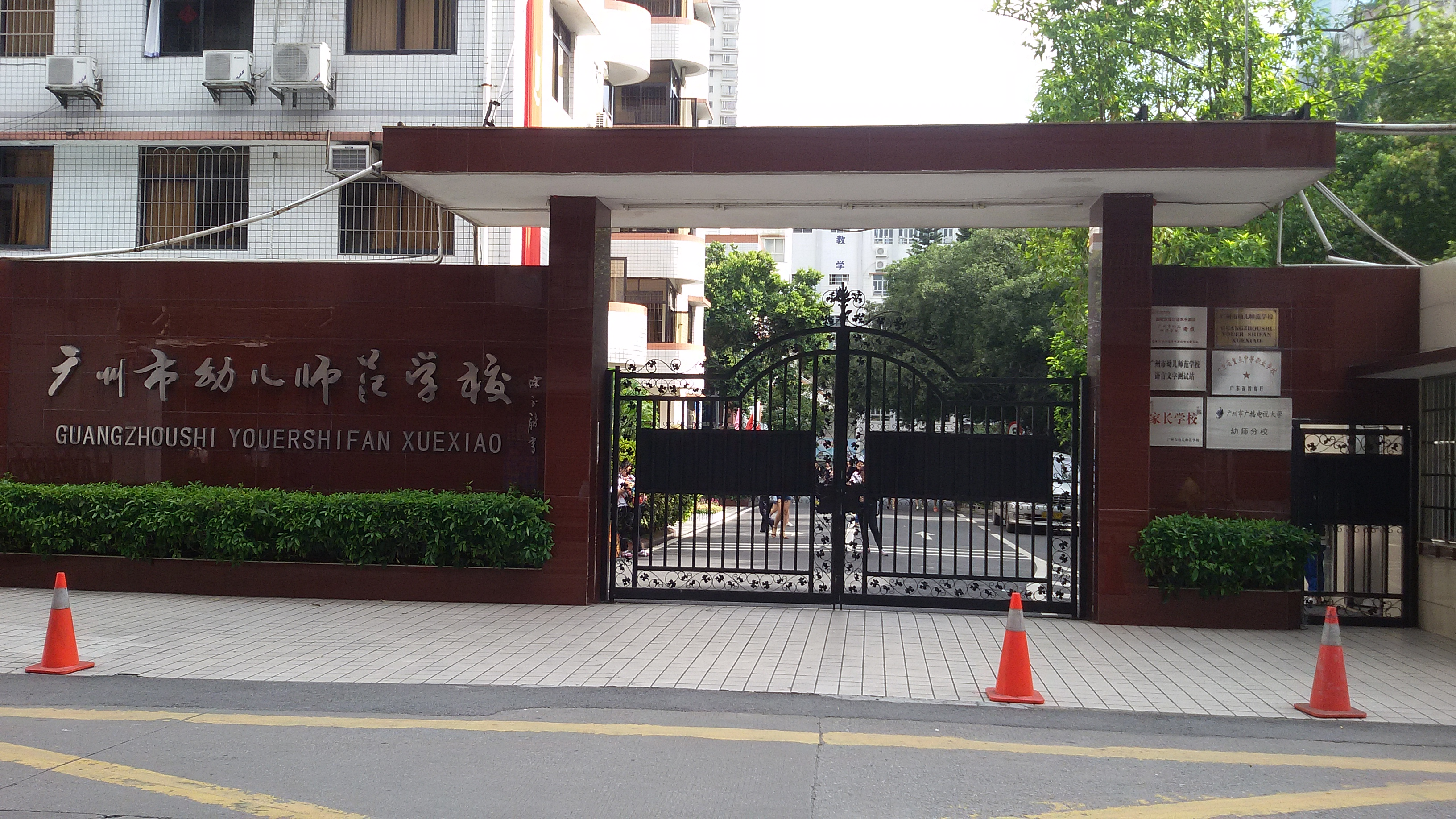 粵語: 廣州市幼兒師範學校